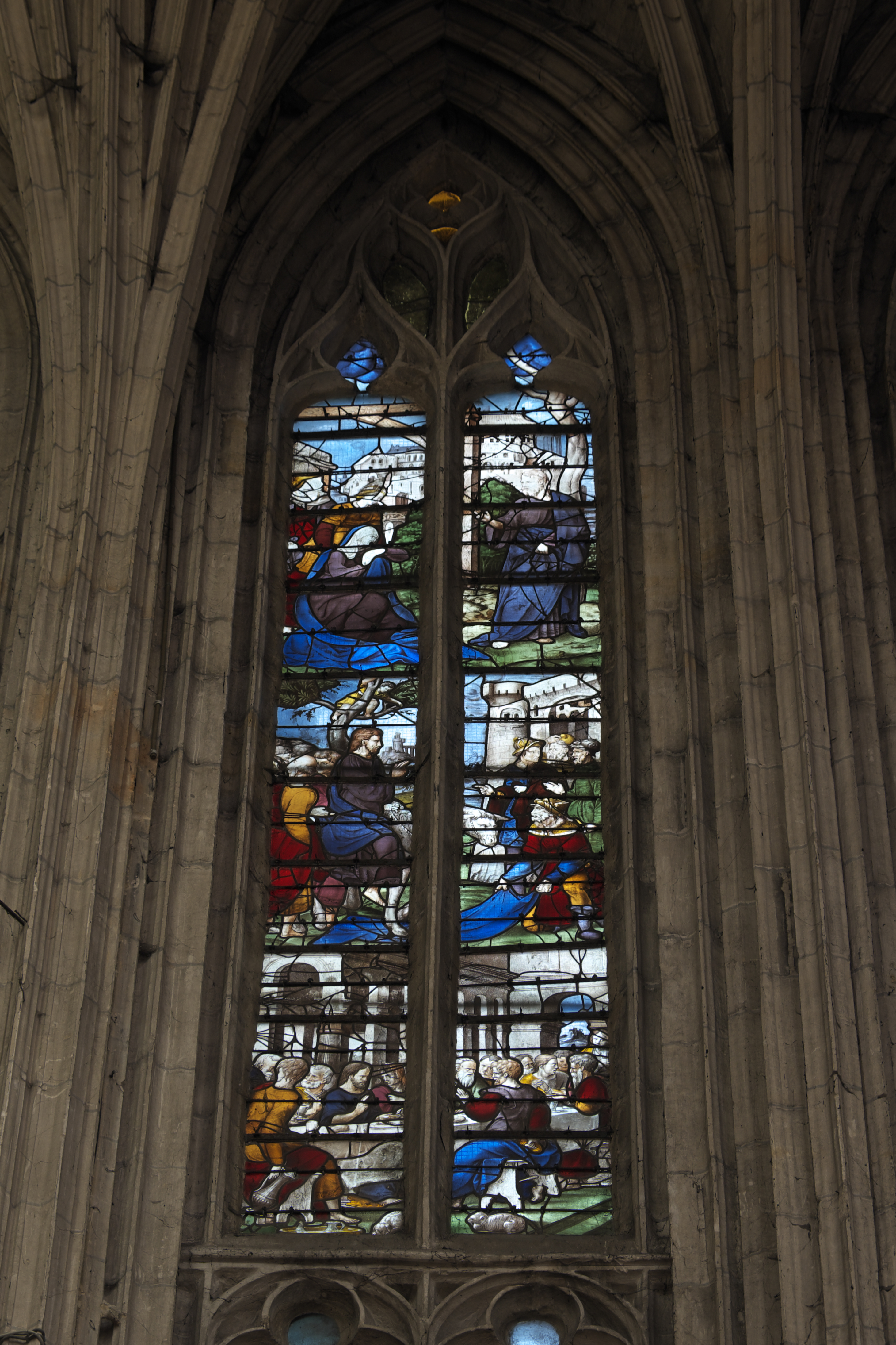 Katholische Kirche Sainte-Foy in Conches-en-Ouche im Département Eure (Haute-Normandie/Frankreich), Bleiglasfenster aus der 1. Hälfte des 16. Jahrhunderts im Chor; Darstellung: Passion Christi